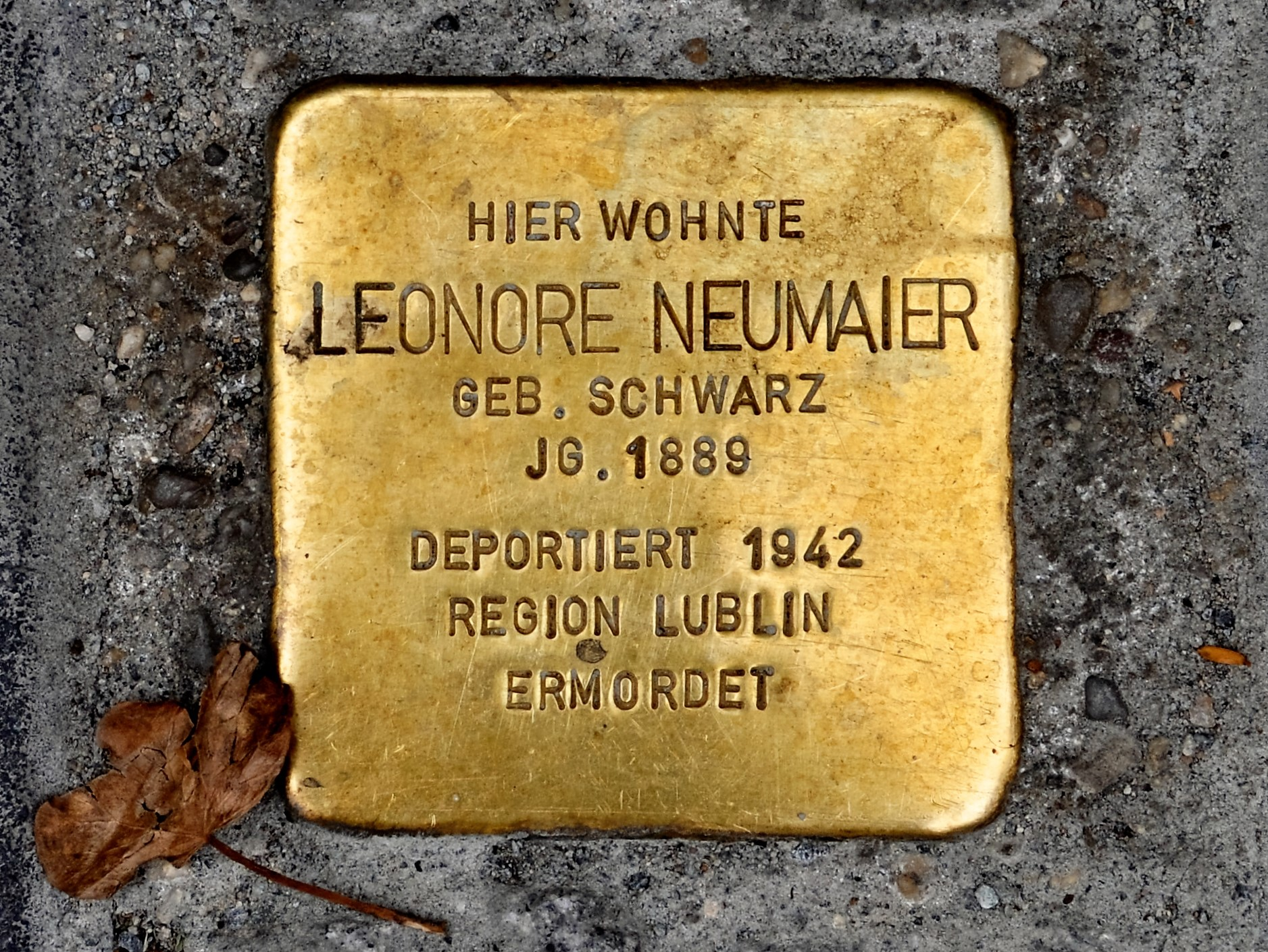 Stolpersteine Freiherr-v.Stein-Str. 15 Leonore Schwarz-Neumaier